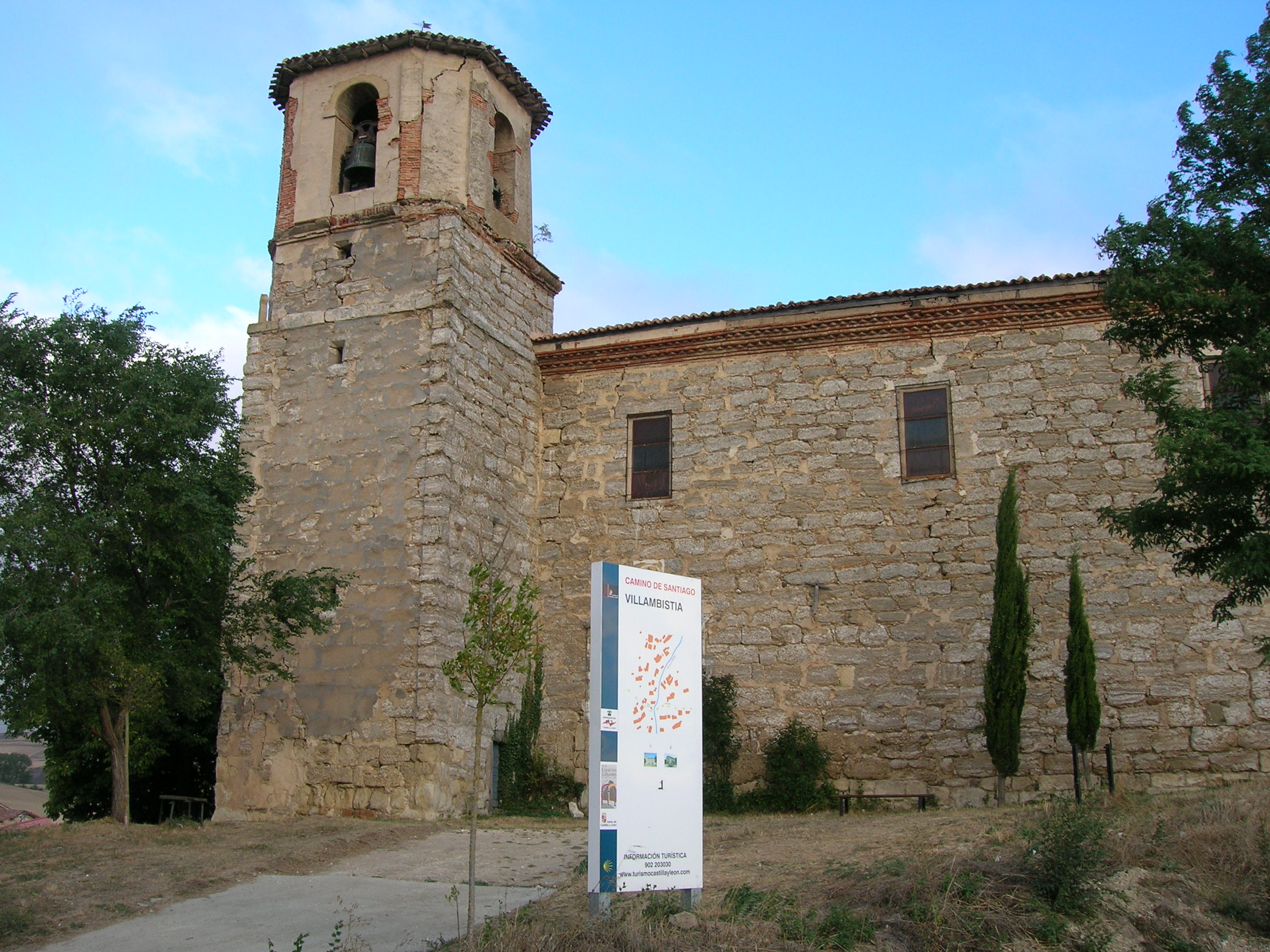 Pequeño pueblo entre Tosantos y Espinosa del Camino.